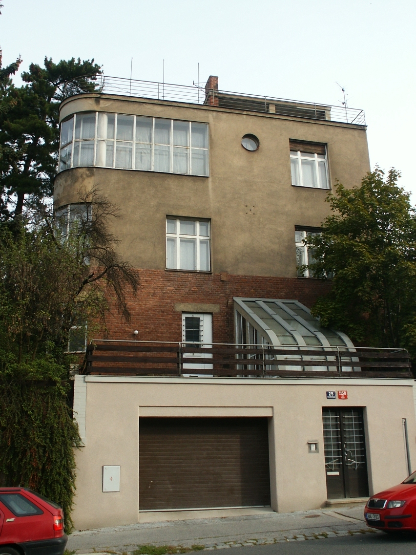 Vila V Holešovičkách 1158/25, Praha 8-Libeň, V Holešovičkách 1158/25